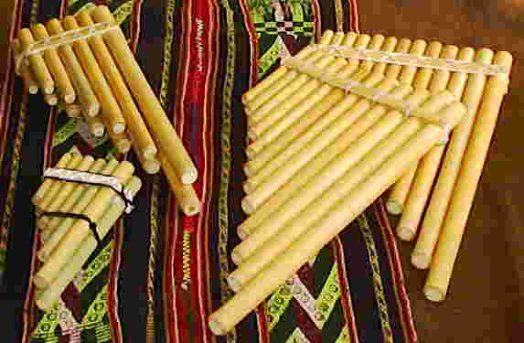 Siku (Zampoña)